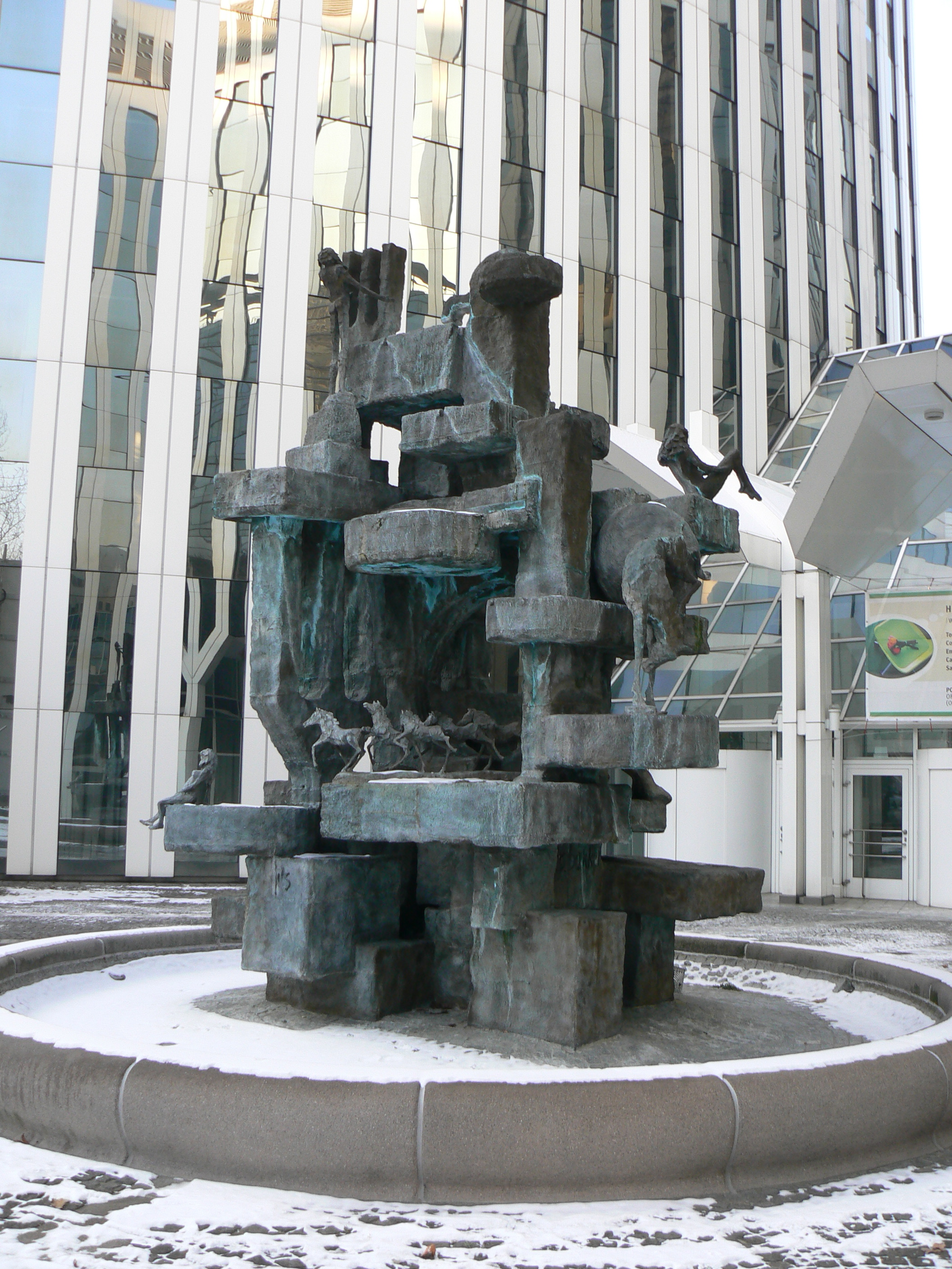 Poseidon-Brunnen mit 3-Zack, 1986, 6 m hohe Bronze des holl. Jits Bakker (1937-2014) vor dem ehemaligen Poseidon-Haus. Theodor-Heuss-Allee 2, Frankfurt-Bockenheim, Sitz der damaligen Hauptverwaltung der Aventis Pharma AG. Das vom DEKA-Fond als Eigentümer revitalisiete, komplett umgebaute Gebäude wurde nach Anmietung und Einzug der ING DiBa AG Hauptverwaltung Deutschland in Anspielung auf den ING-Löwen in "LEO" umbenannt. Der Poseidon-Brunnen wurde vor den Umbauarbeiten entfernt. 2013, nach erfolgtem Einzug der deutschen Tochter des niederländischen Konzerns, der größten Direktbank Europas, wurde der Poseidon-Brunnen des niederländischen Bildhauers Jits Bakker hier nicht mehr aufgestellt. Sein neuer Standort ist unbekannt. Seinen Platz nimmt eine orangefarbene übergroße Figur des Künstler Ottmar Hörl ein, der als Symbol für den historischen Tag der Deutschen Einheit das „Einheitsmännchen“ erschuf. Tausende Skulpturen gingen als Botschafter auf Deutschlandreise. Und eins steht noch heute vor dem LEO-Gebäude in Frankfurt. Es erinnert an ein Leuchtsymbol einer Fußgängerampel.